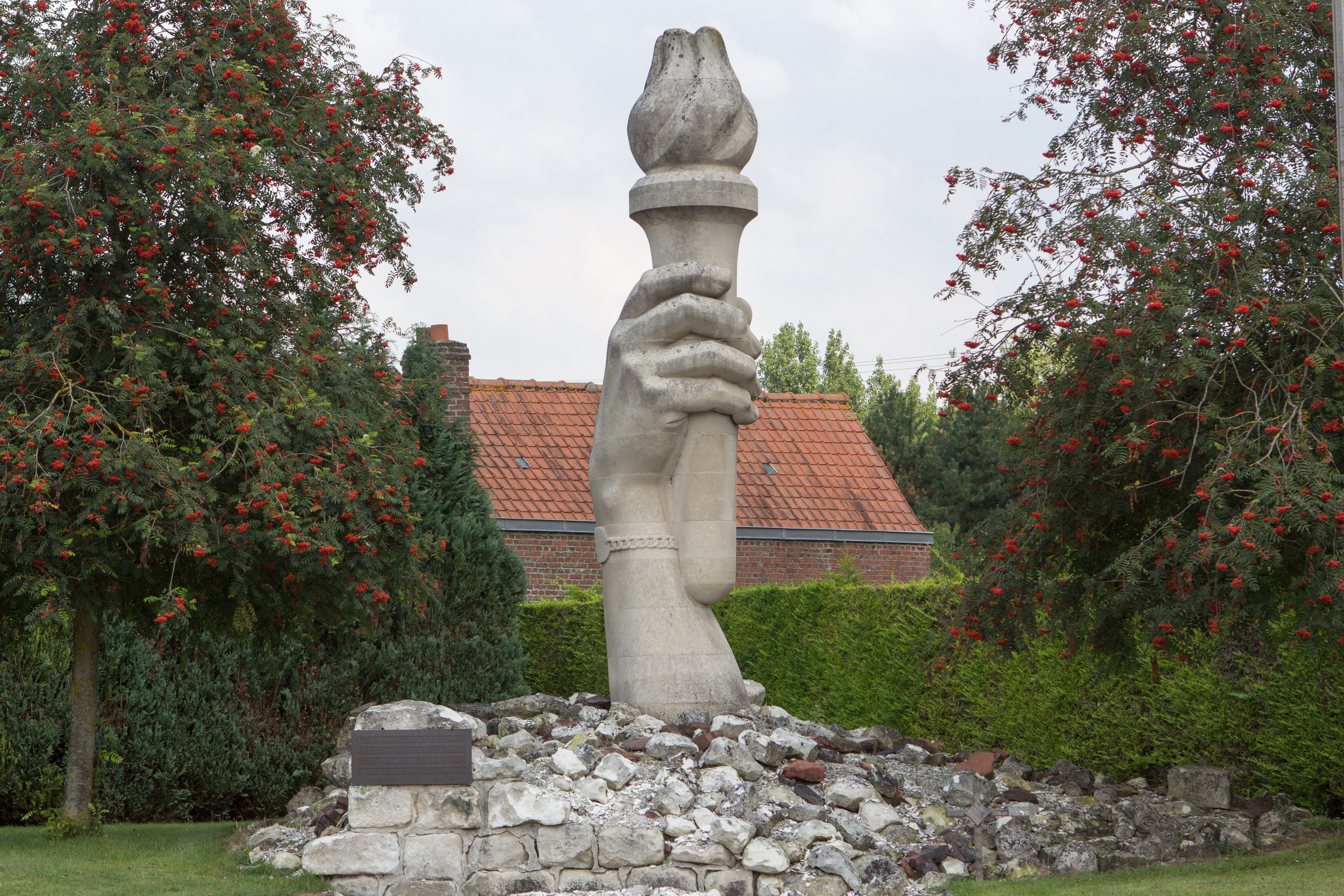 Le flambeau de la Paix de Neuville-Saint-Vaast / Neuville-Saint-Vaast, Pas-de-Calais, France